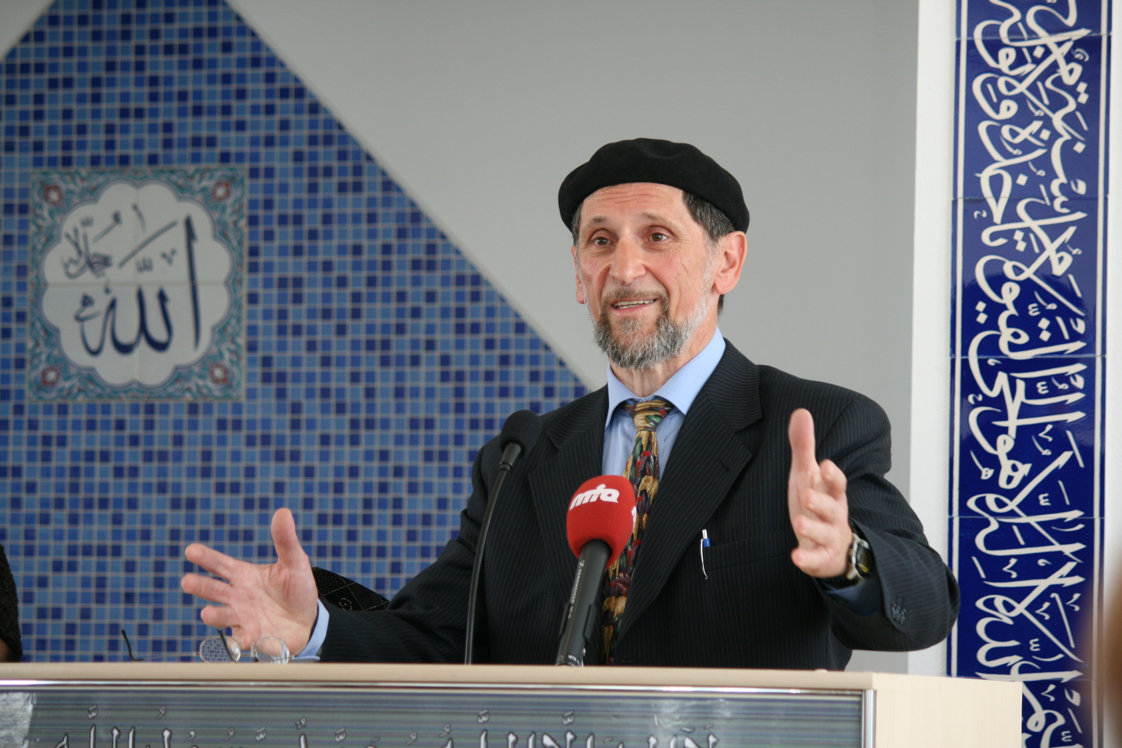 Abdullah Uwe Wagishauser, Vorsitzender der Ahmadiyya Muslim Jamaat Deutschland, beim Empfang zur Eröffnung der Anwar-Moschee in Rodgau (Hessen)